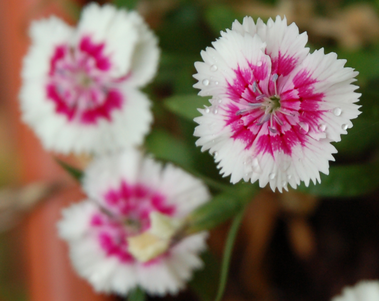 Michael and Michal Porch Matzuva